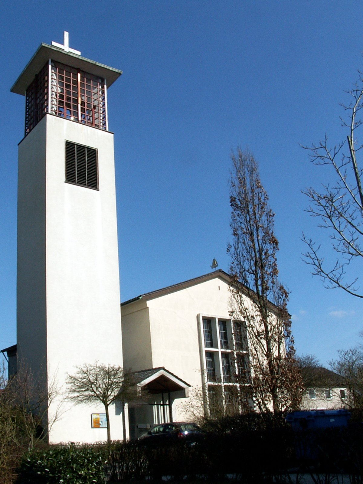 ehem. ev.-ref. Gnadenkirche in Osnabrück, Stadtteil Schinkel, Ansicht von Südwesten